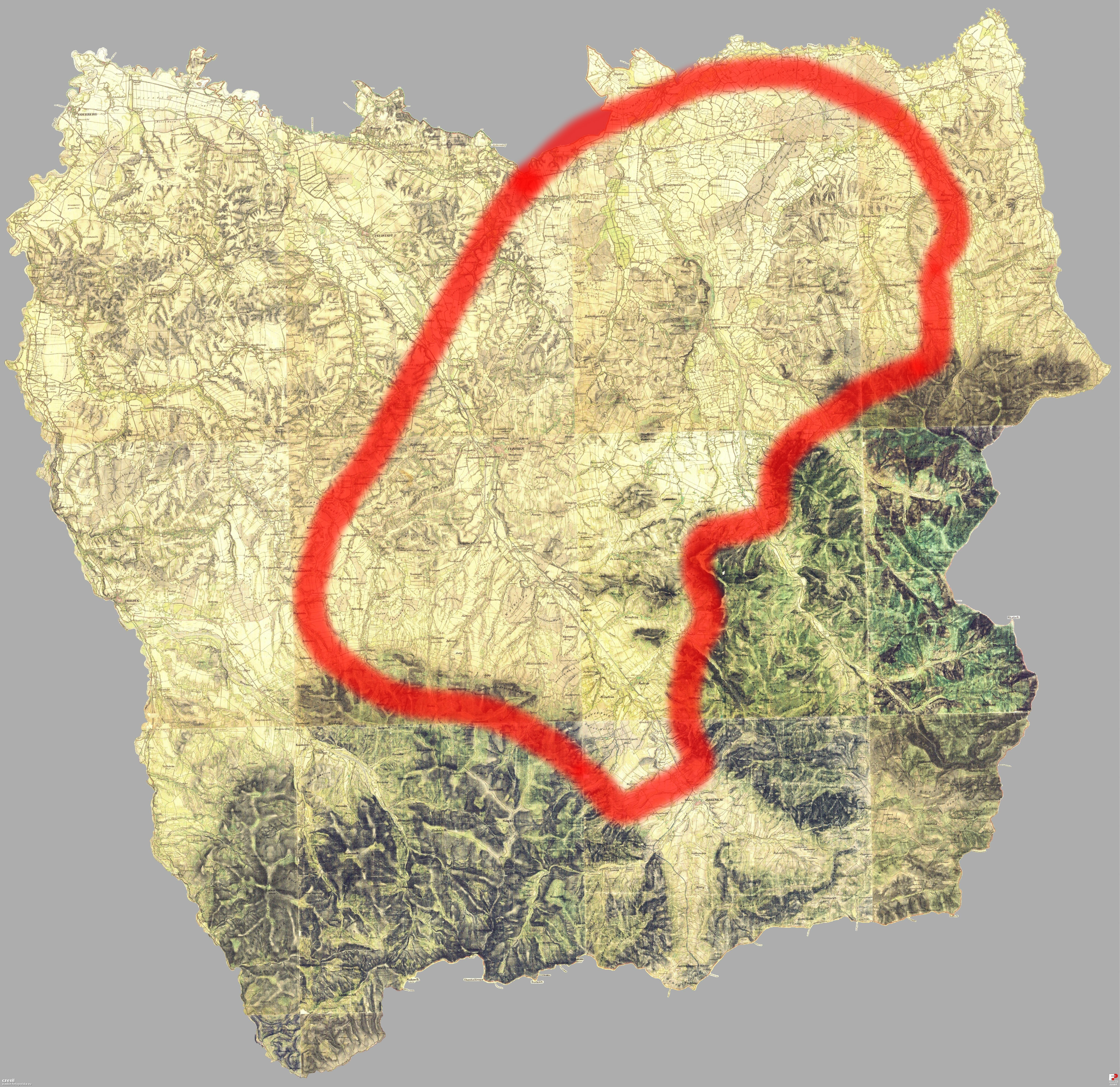 Wałasi cieszyńscy na mapie austriackiej (1836-1852)